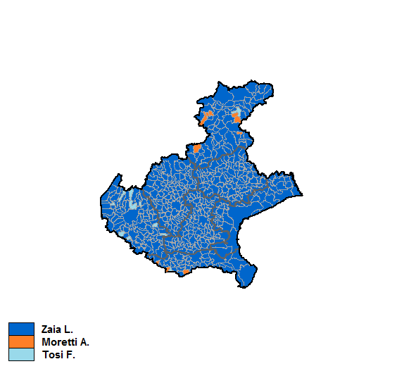 Candidati vincitori nei singoli comuni nelle elezioni regionali del 2015 in Veneto.